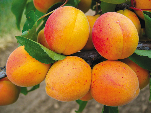 Sklizeň rok 2013